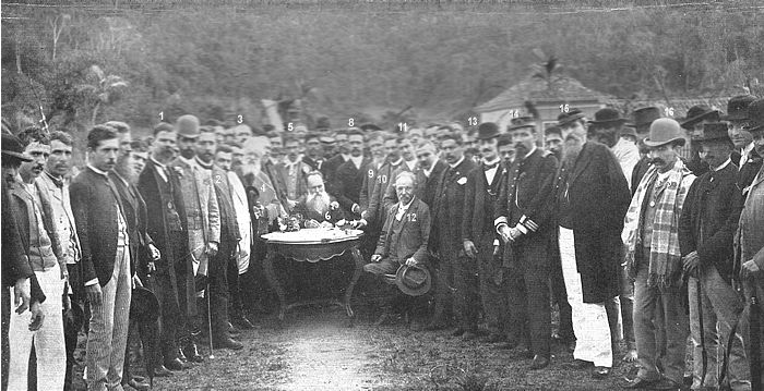 Várzea, 1890 - Praça Santa Thereza, hoje Balthazar da Silveira. Assinatura, aos 6 de Julho de 1890, do Decreto de elevação de Therezopolis a cidade pelo então Governador do Estado do Rio de Janeiro, Dr. Francisco Portella, que para ela transferiu a capital do Estado por Decreto de 5 de Outubro seguinte. 1) Sr. Figueiredo; 2) Dr. A. Werneck; 3) Sr. Palhares: 4) Pintor Nicoláo Facchinetti; 5) Barão de Mesquita, Presidente da Companhia E. F. Therezopolis; 6) Dr. Francisco Portella, Governador do Estado; 7) Alferes João Chrisostomo; 8) Dr. Godofredo Cunha, Chefe de Policia do Estado, depois Ministro do Supremo Tribunal Federal; 9) Francisco P. dos Santos Leal, pharmaceutico local; 10) Engenheiro Floresta de Miranda; 11) Joaquim de Abreu Lacerda, antigo redactor do Jornal do Commercio; 12) Domingos Moitinho, Director da Cia. E. F. Therezopolis; 13) José Bandeira Vianna, depois Collector Estadual; 14) Capitão Silva Brandão; 15) Major Eloy; 16) Felix Cardoso da Silva, guarda livros da Cia. E. F. Therezopolis.